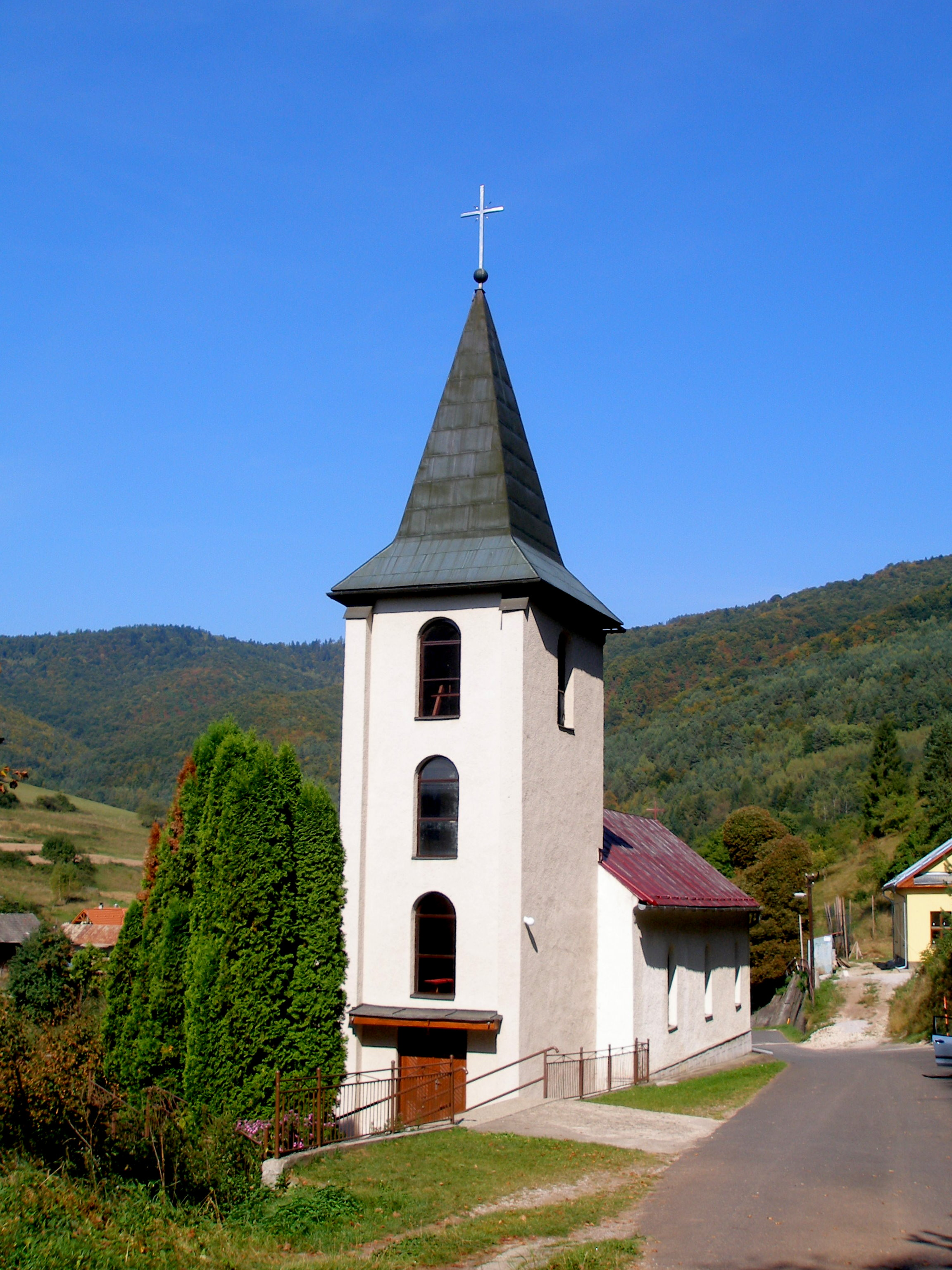 Spišská obec Hrišovce okres Gelnica.